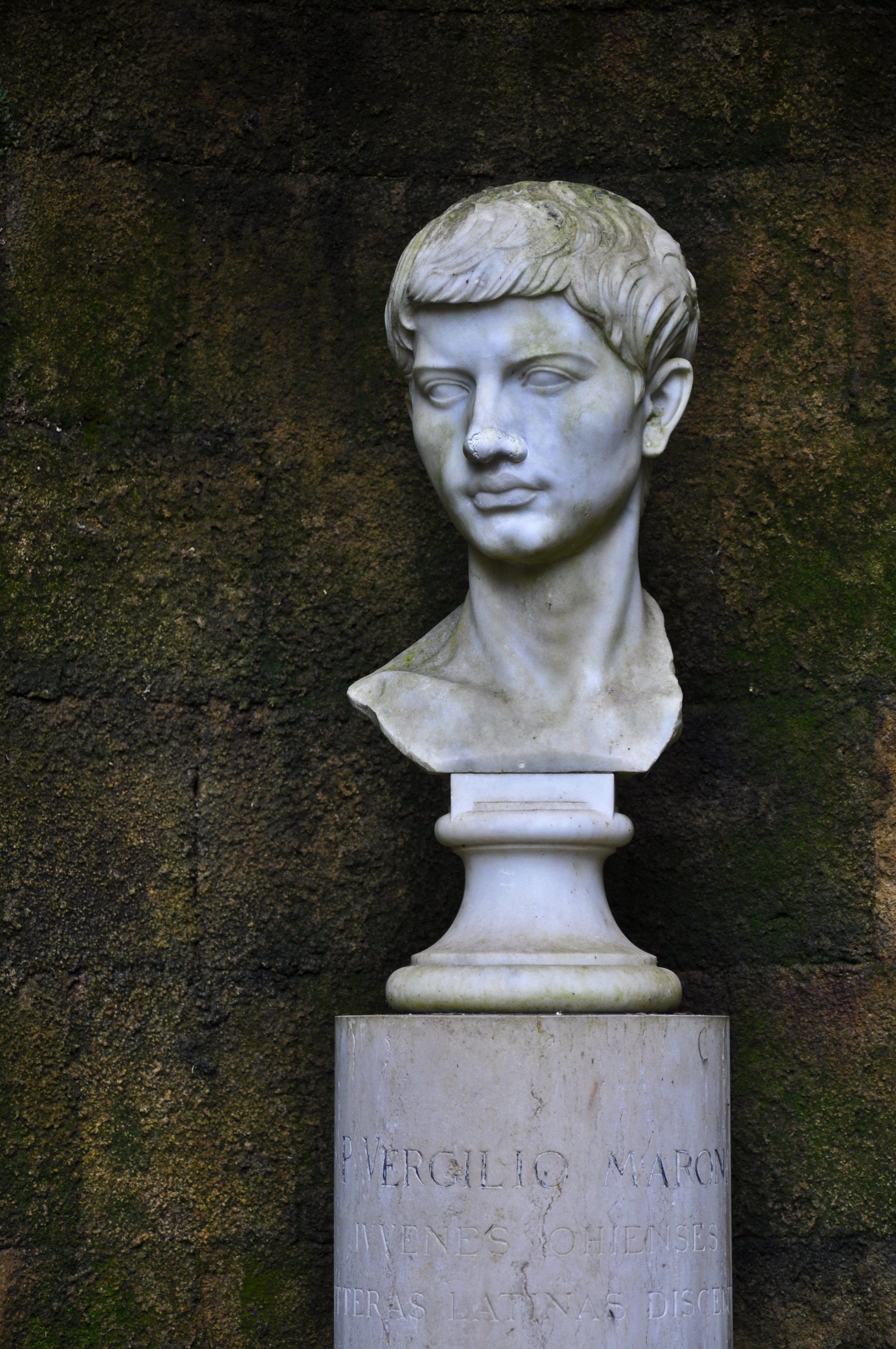 Busto di Virgilio, parco Vergiliano (Napoli)